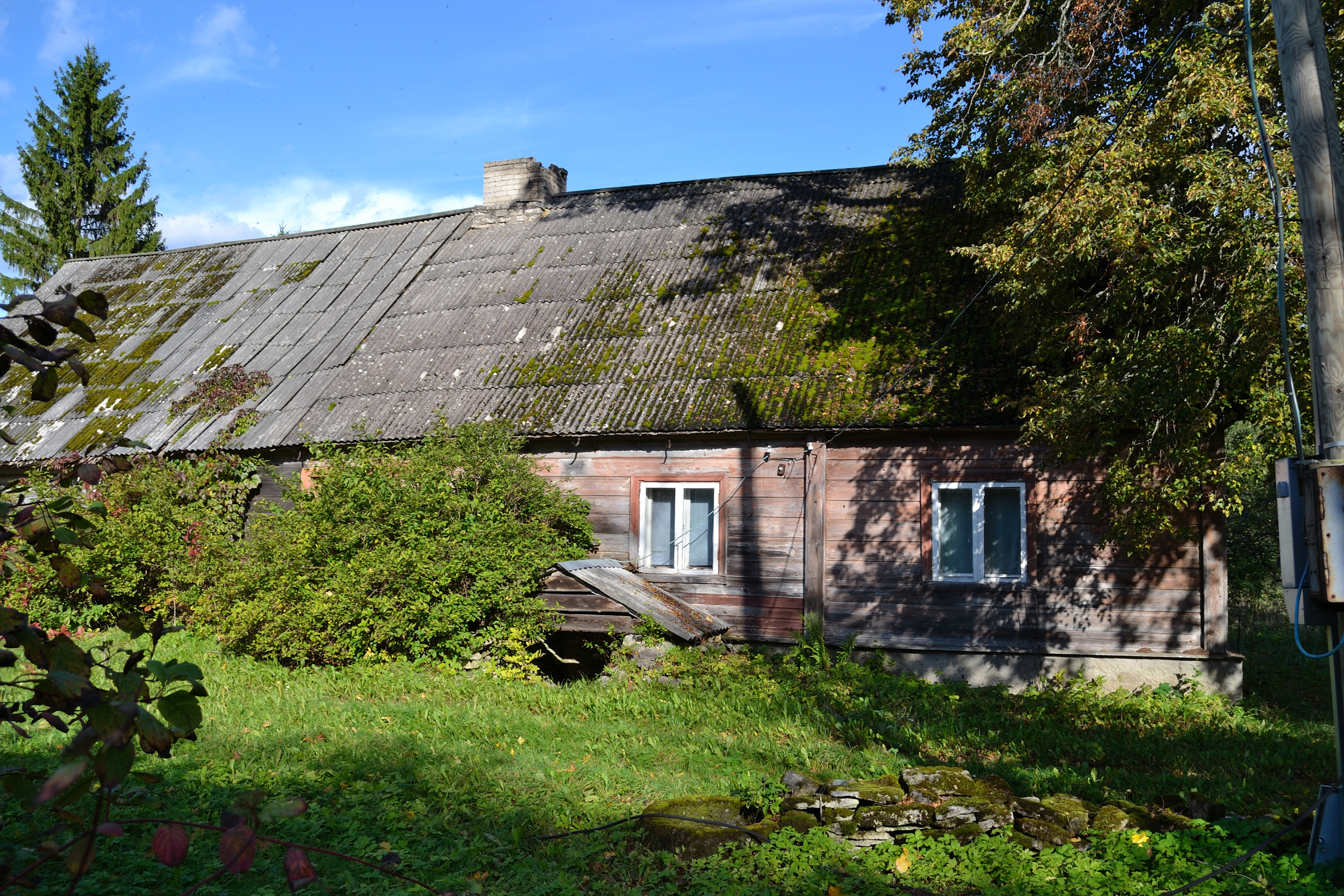 Juuru mõisa valitsejamaja